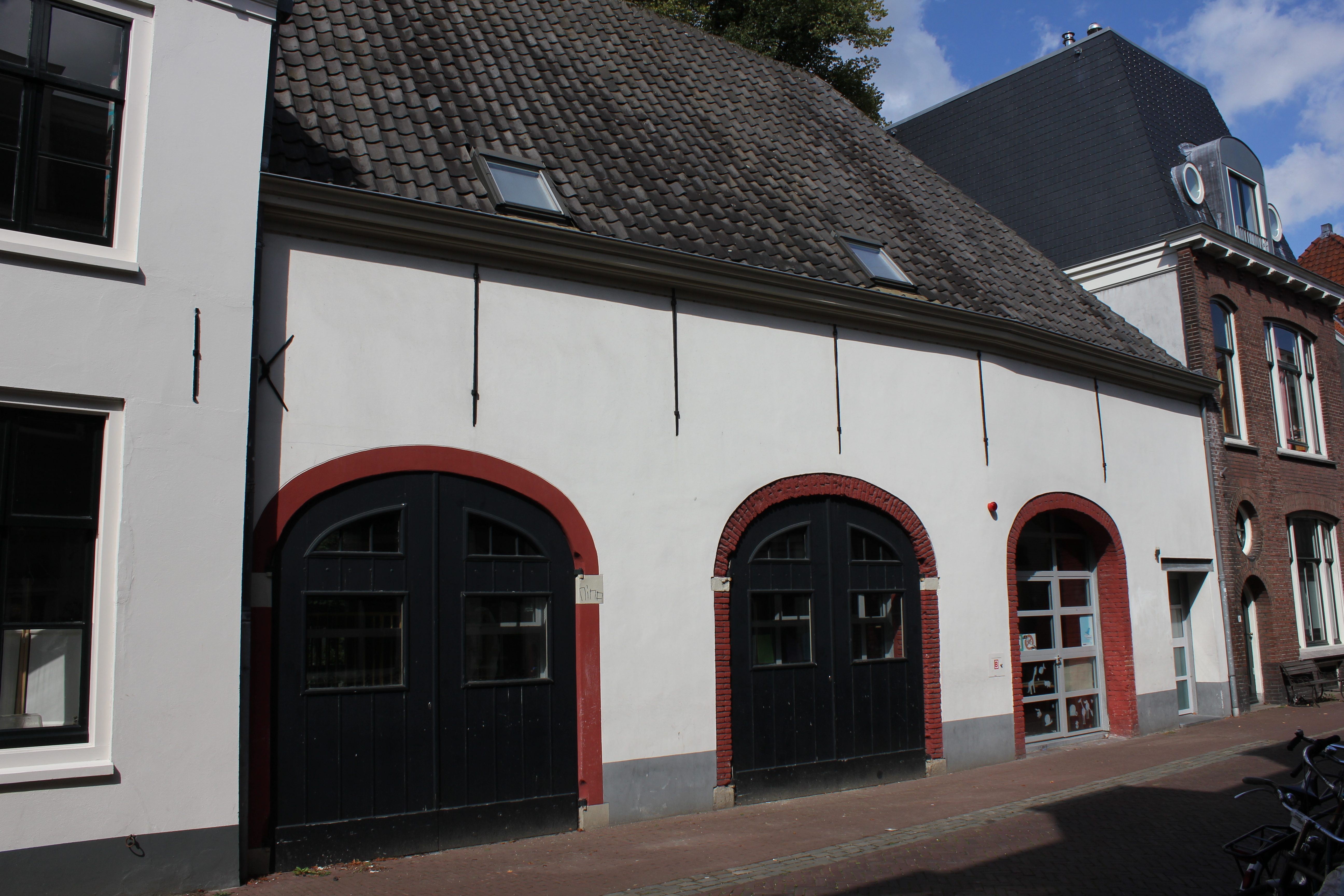 Rijksmonument in Utrecht